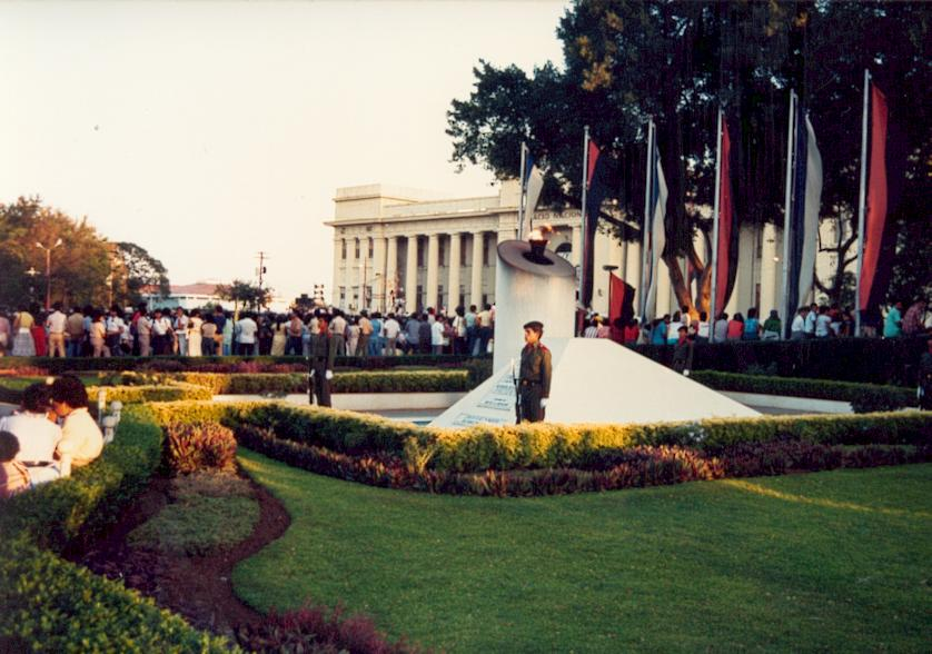 Mausoleo de carlos Fonseca. Managua, Nicaragua, América Central (1988).